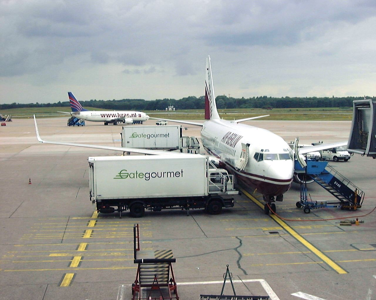 Boeing 737-800 - Air Berlin - Catering in EDDH (Hamburg)